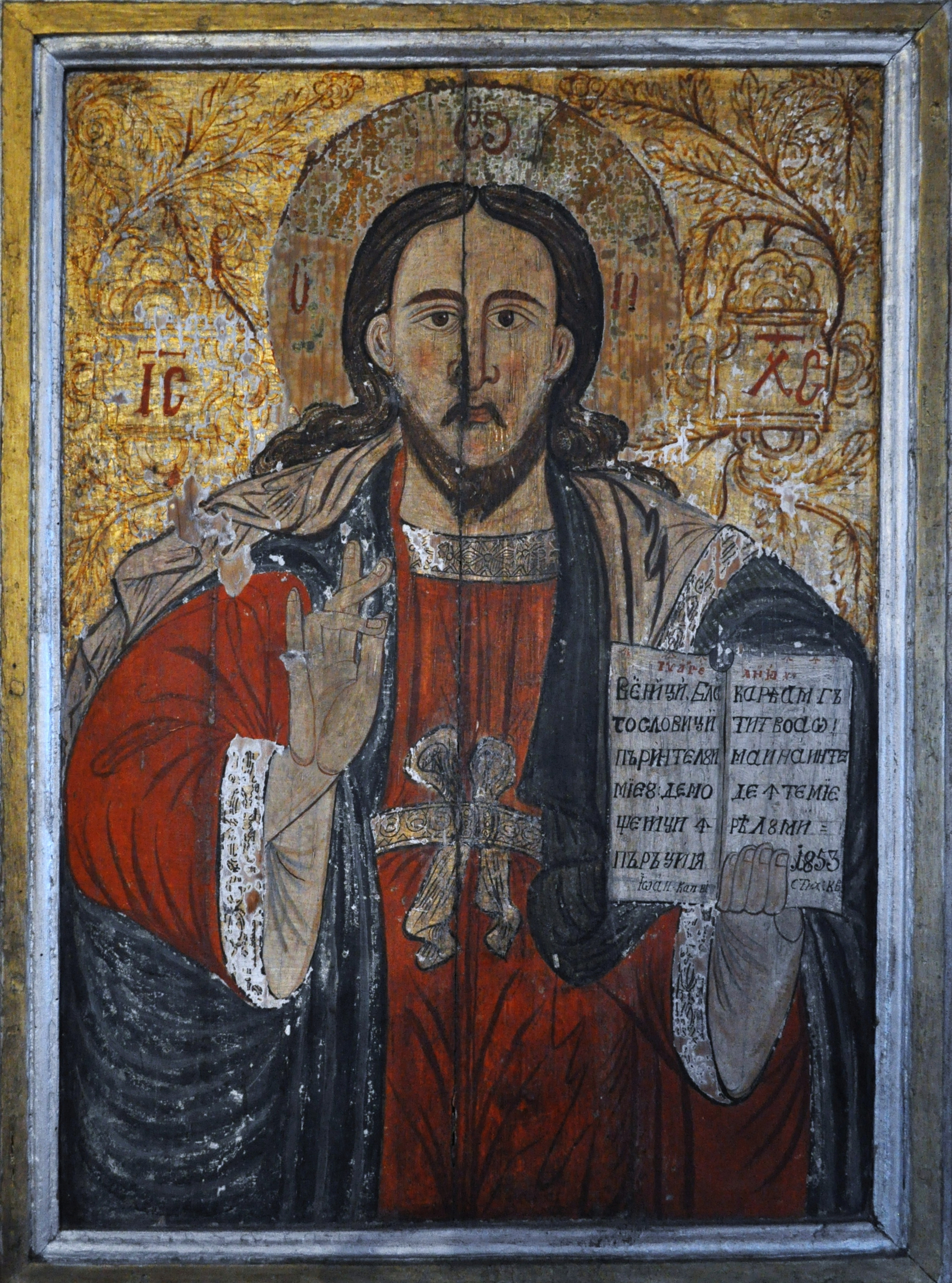 Biserica de lemn „Sfinții Arhangheli” din Runc, județul Alba